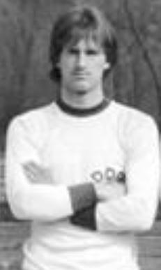 Title: Mannschaftsfoto der DDR-Fußball-Juniorenauswahl Factual corrections and alternative descriptions are encouraged separately from the original description. Additionally errors can be reported at this page to inform the Bundesarchiv. Original historic description: ADN-ZB-Kluge-3.5.80-Leipzig: Mannschaftsbild der DDR-Juniorenauswahl 1980. Stehend v.l.: Trainer Hermann Bley, Rainer Ernst, Gerd Seifert, Peter Englisch, Ranian Holata, Carsten Sänger, Frank Rillich, Falko Götz, Lars Petzold, Trainer Werner Basel. Hockend v.l.: Bernd Nemetscheck, Lutz Radtke, Andreas Rath, Thomas Michaelowski, Markus Henkel, Andreas Zachhuber, Uwe Bredow, Jochen Illert. Das XXXIII. UEFA-Juniorenturnier findet vom 16.-25.5.1980 in der DDR statt.